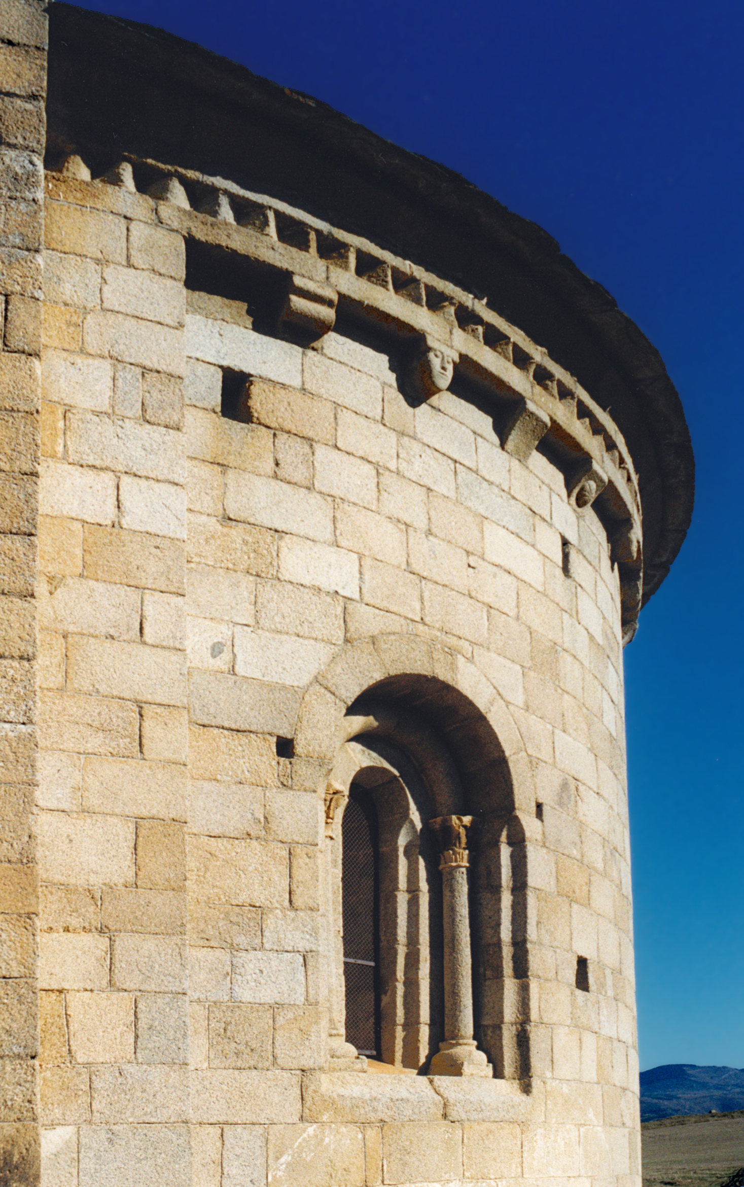 France - Cerdagne - Église Saint-Martin d'Hix